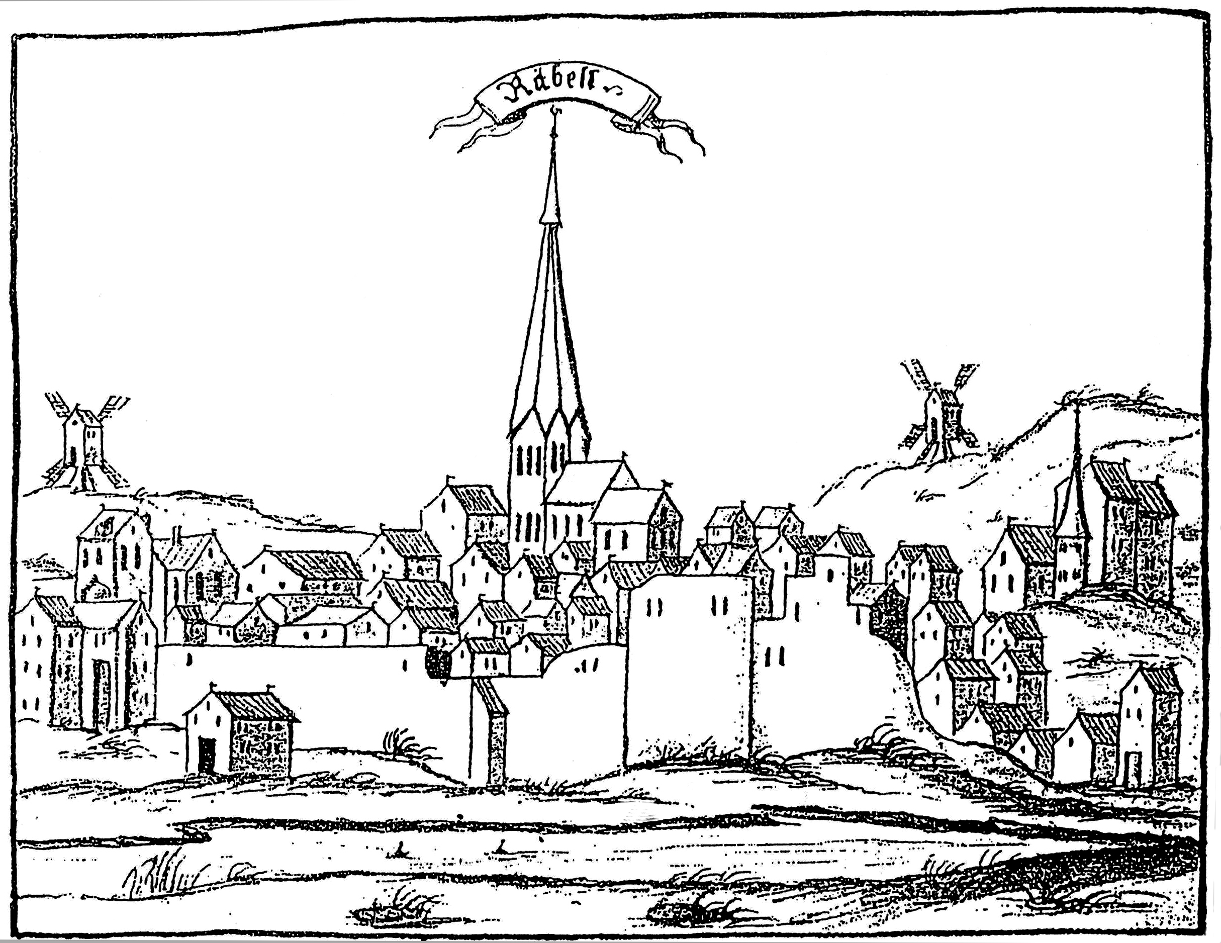 Röbel, Lkr. Müritz, Tuschezeichnung aus der Universitätsbibliothek Rostock.